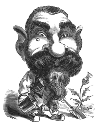 Portrait satirique de Alphonse Karr.